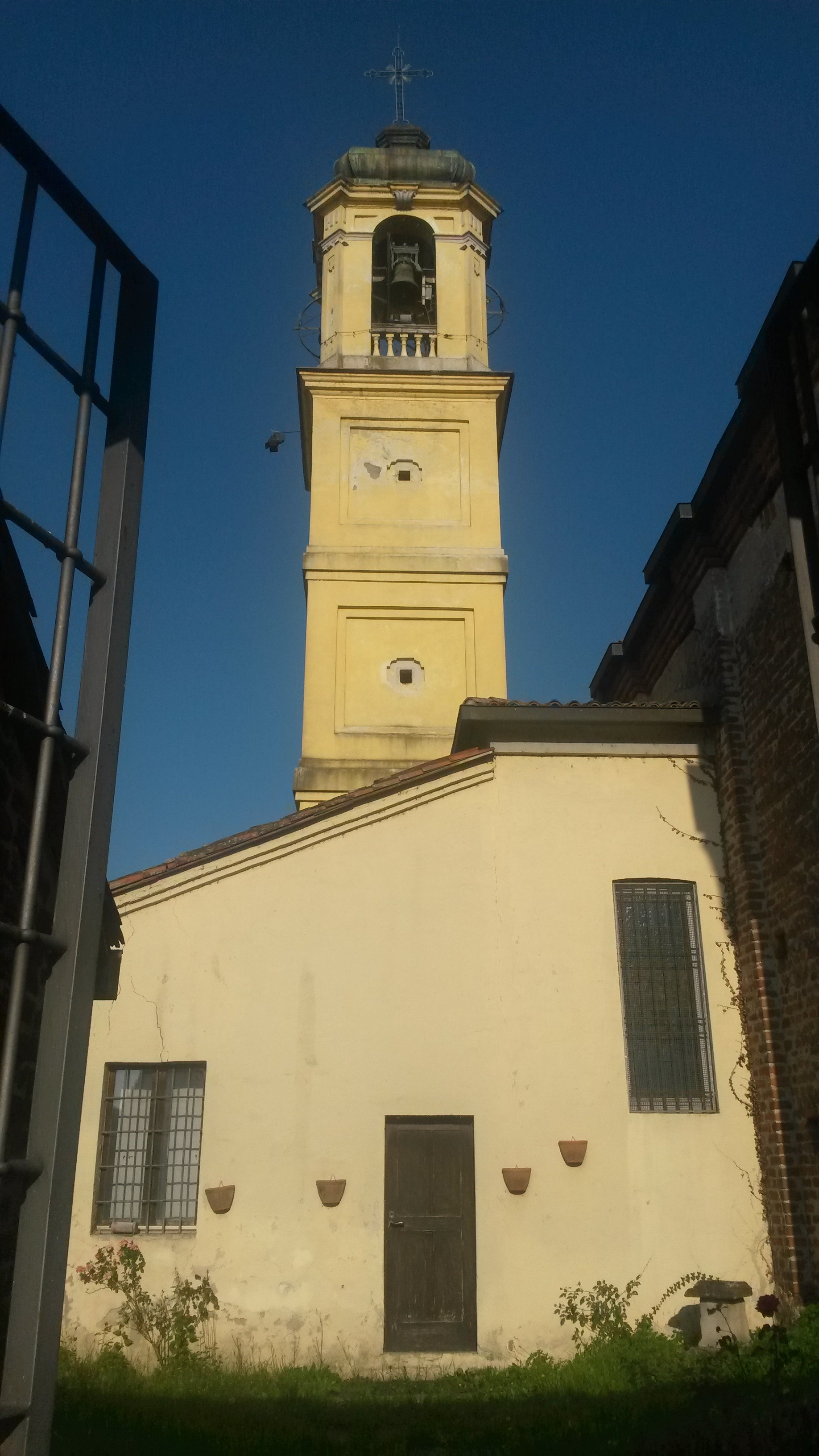 Particolare del campanile della chiesa parrocchiale di Fallavecchia, frazione di Morimondo (MI)